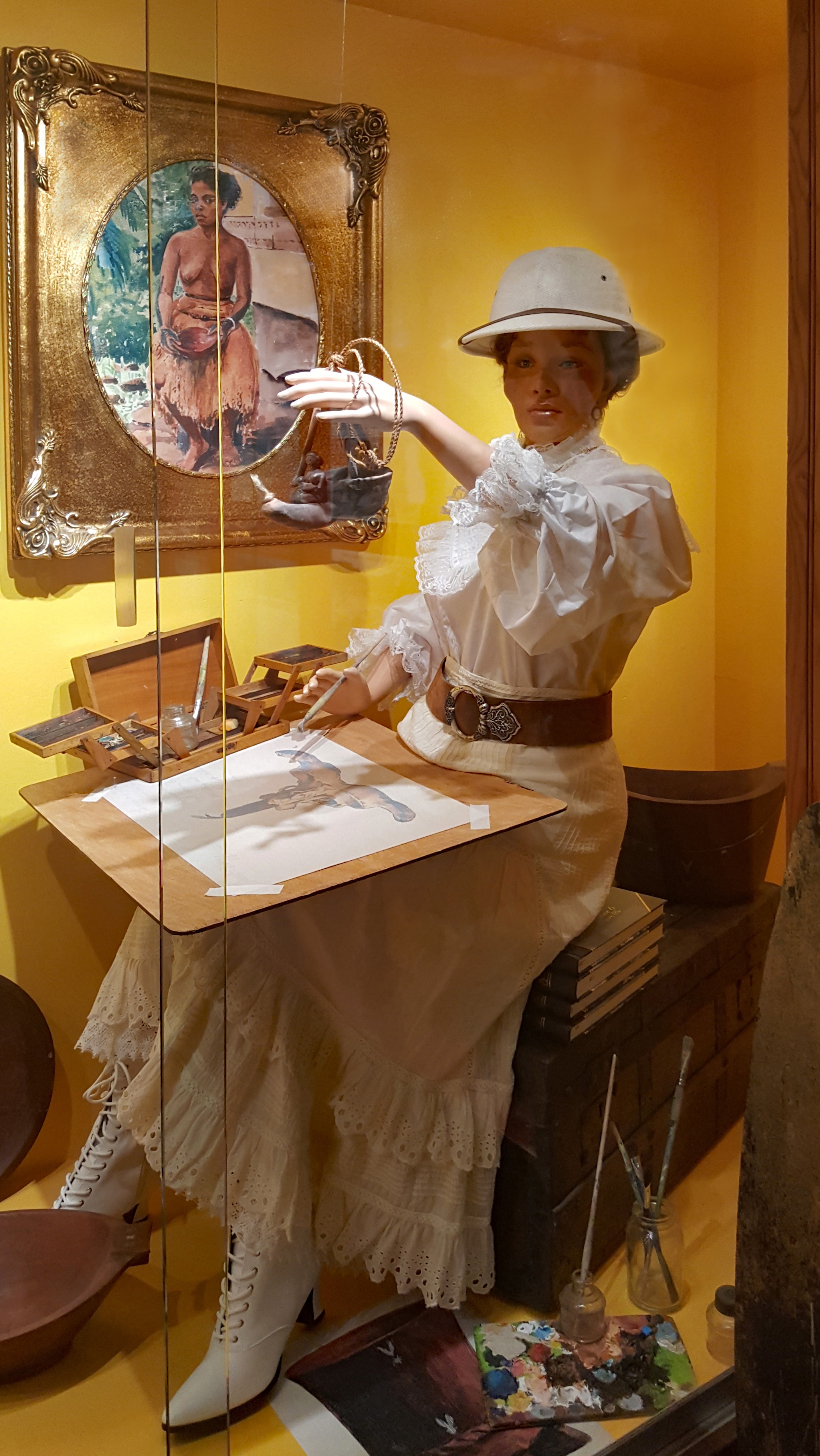 Elisabeth Krämer-Bannow fertigte zahlreiche Aquarelle und Zeichnungen an, die später die gedruckten Forschungsergebnisse der Hamburger Südsee-Expedition illustrierten. Im Etpison-Museum in Koror, Palau, wird sie in Lebensgröße bei der Arbeit gezeigt.